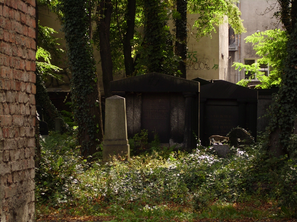 cmentarz żydowski w Katowicach